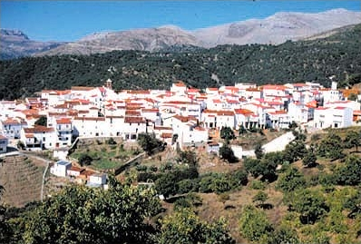 Vista desde lejos de Faraján (Málaga, España)